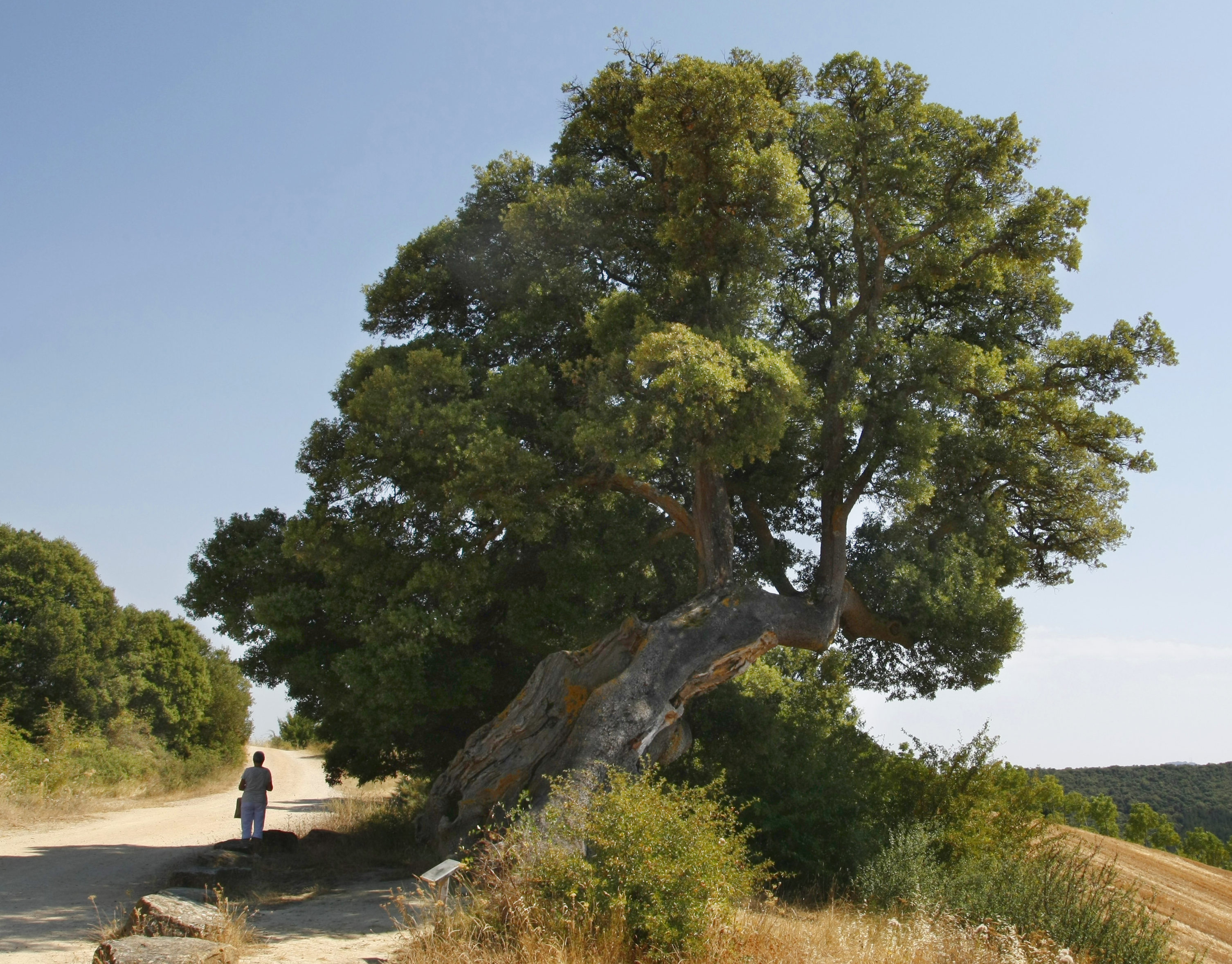 Eraulgo artea